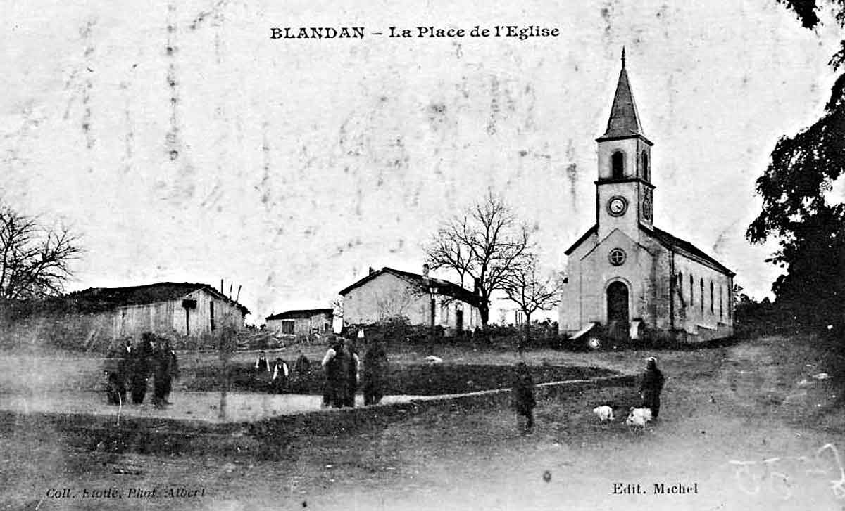 L'eglise , la mairie actuelle